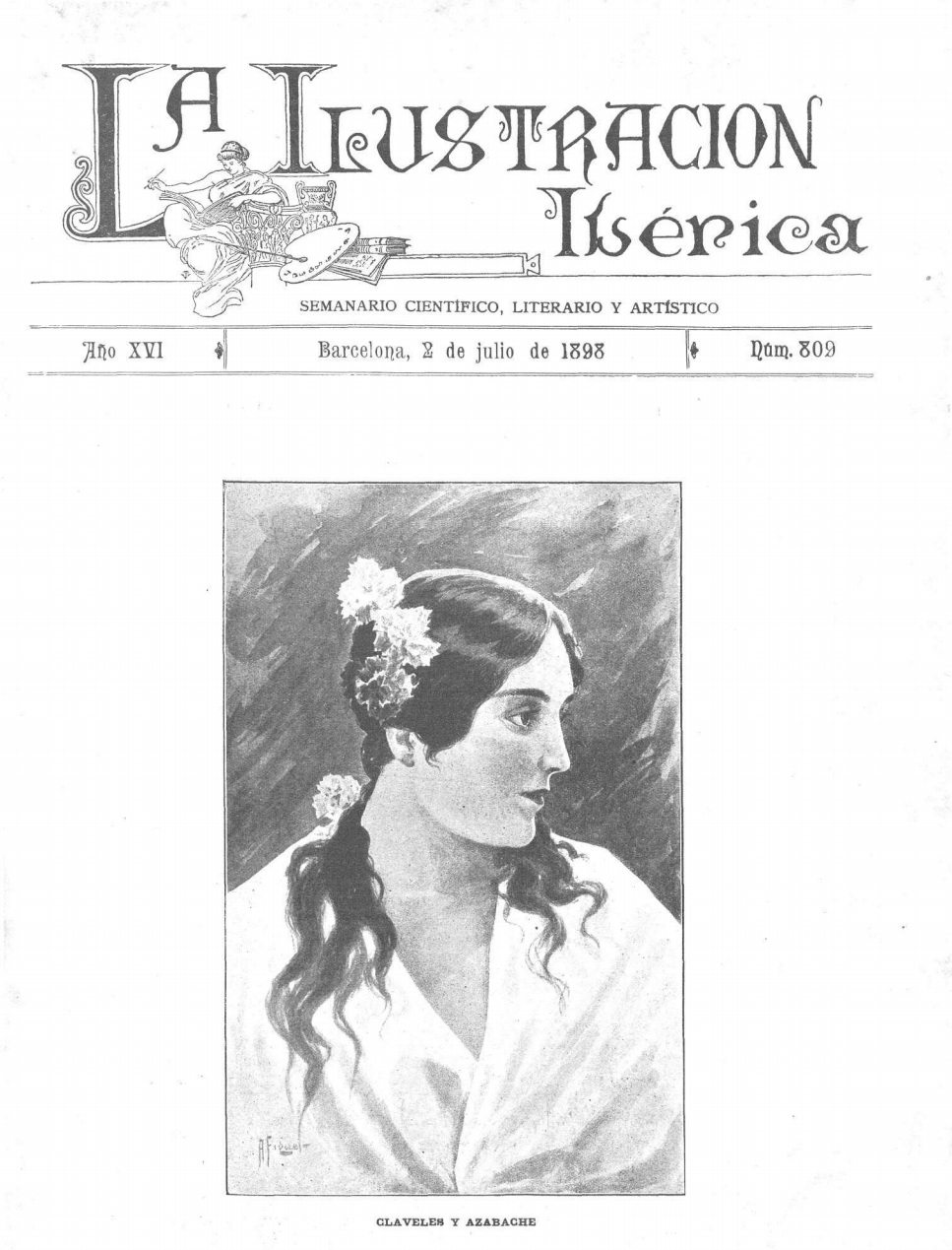 Portada del setmanàri La Ilustración Ibérica; exemplar (num.809)